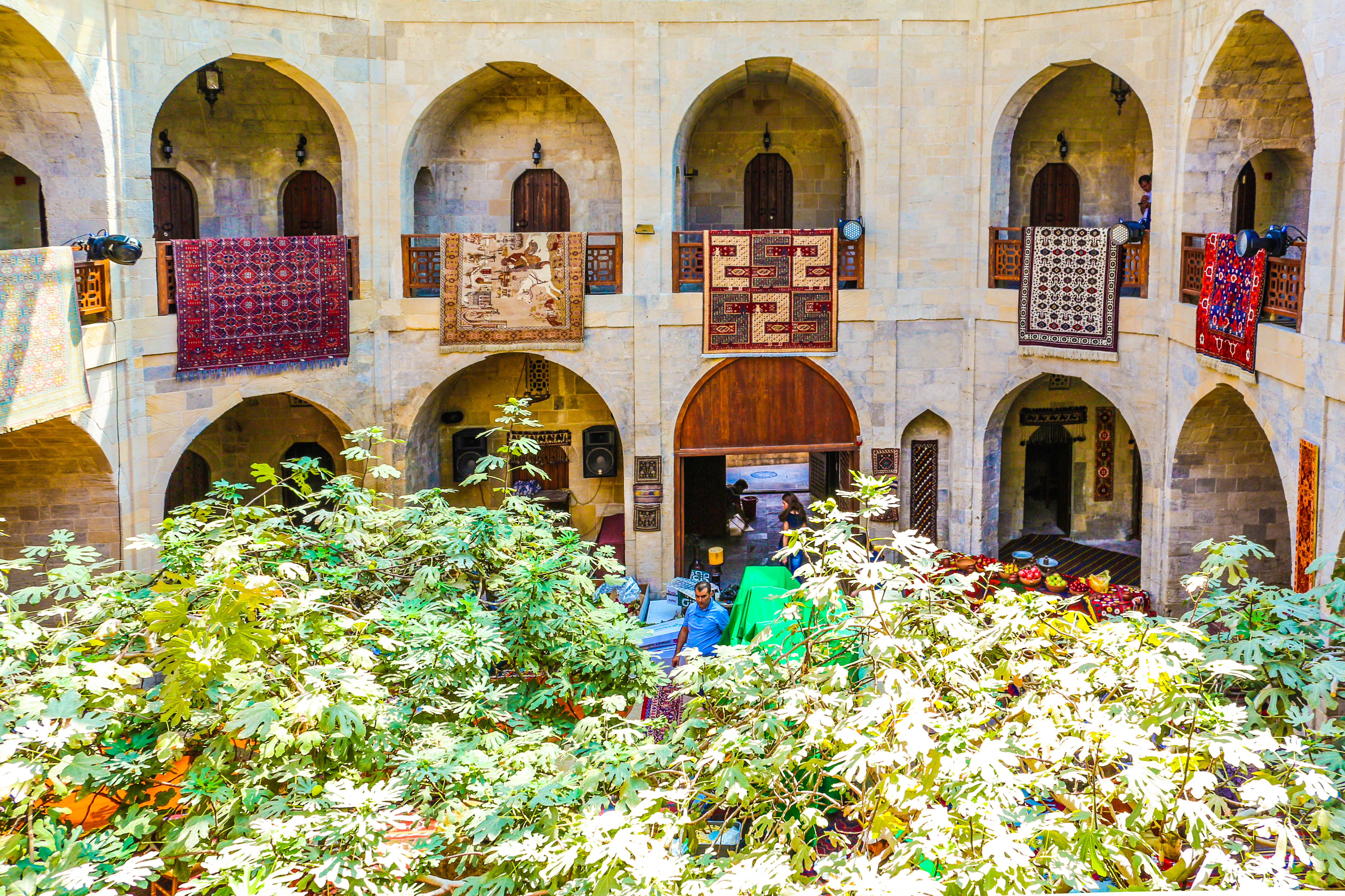 İkimərtəbəli karvansaray daxili həyət